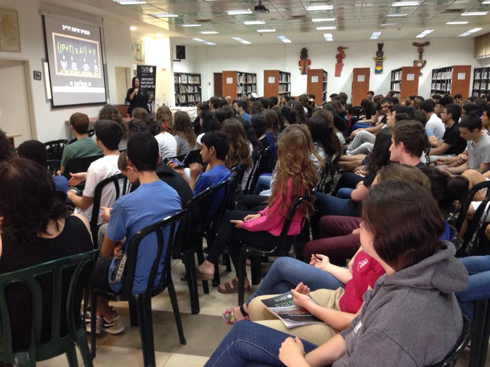 סדנת דרייב במערכת החינוך